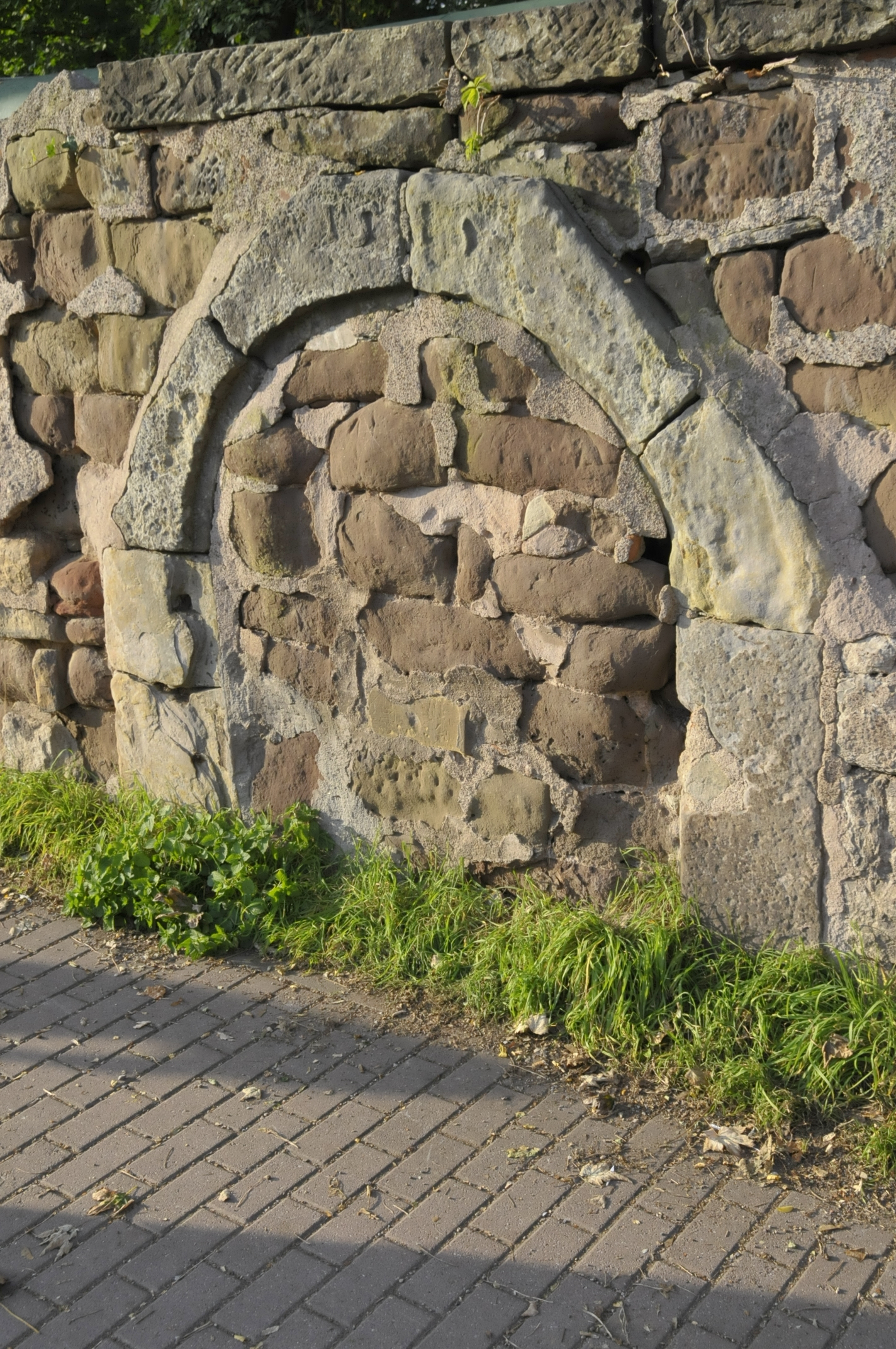 Gotha, Pestpförtchen in der alten Mauer des Friedhofs II